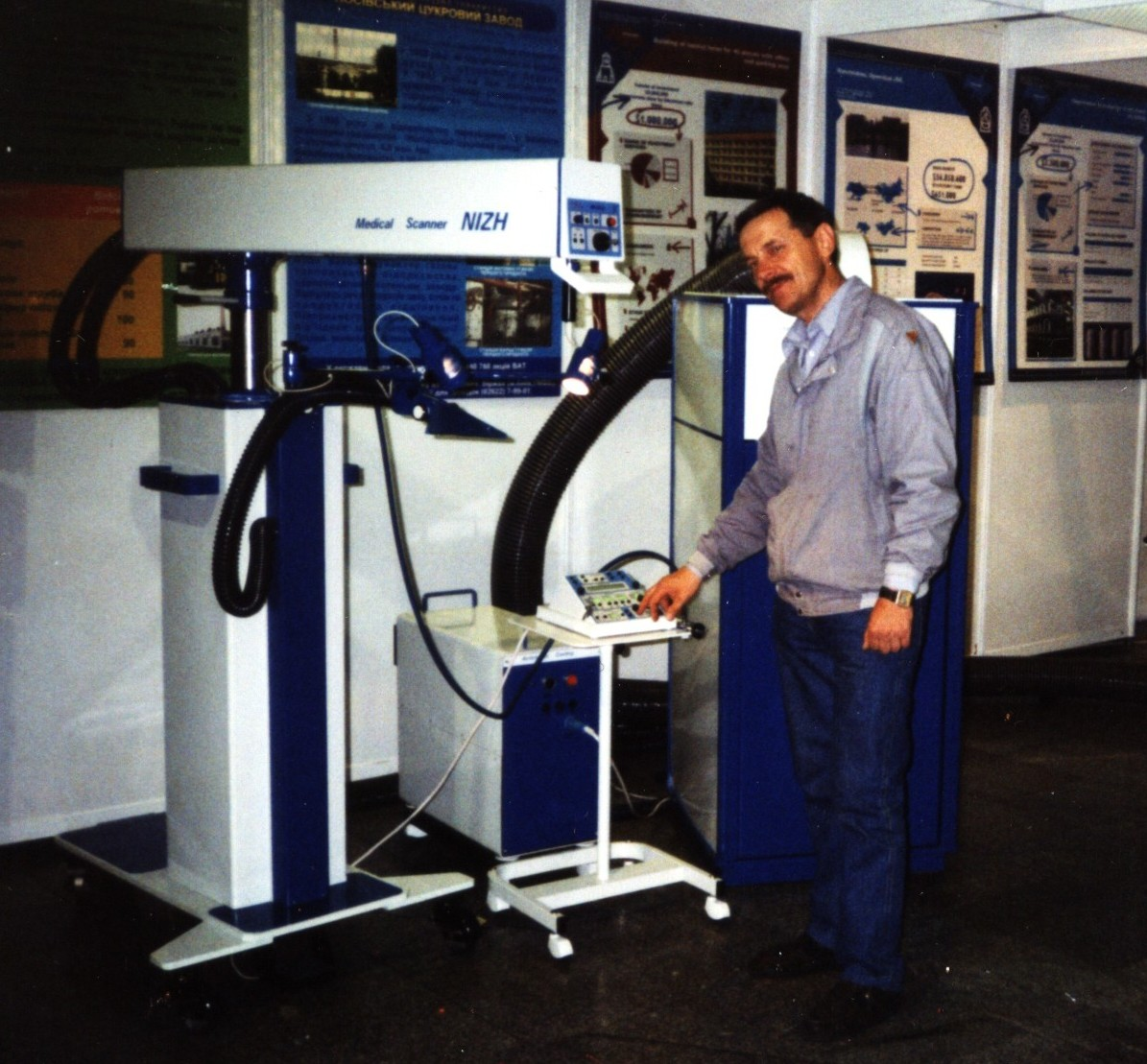 Лазерний хірургічний апарат СМ-2002 - Nizh